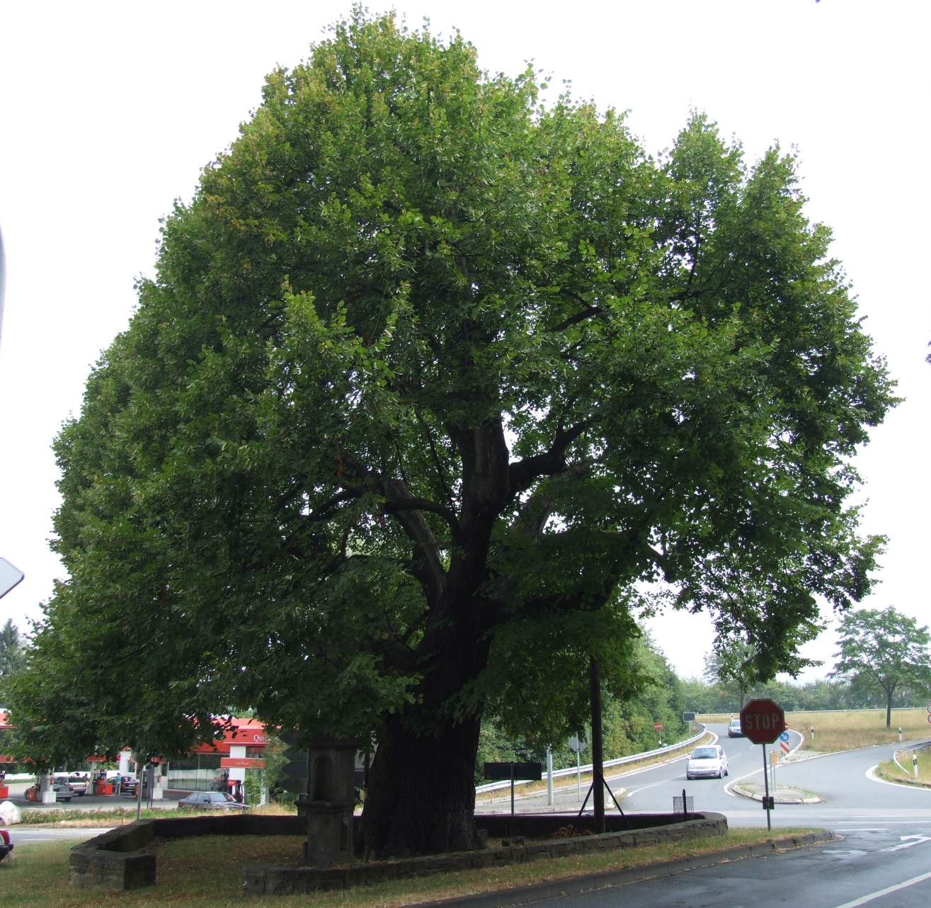 Sinziger Linde Tilia sp.